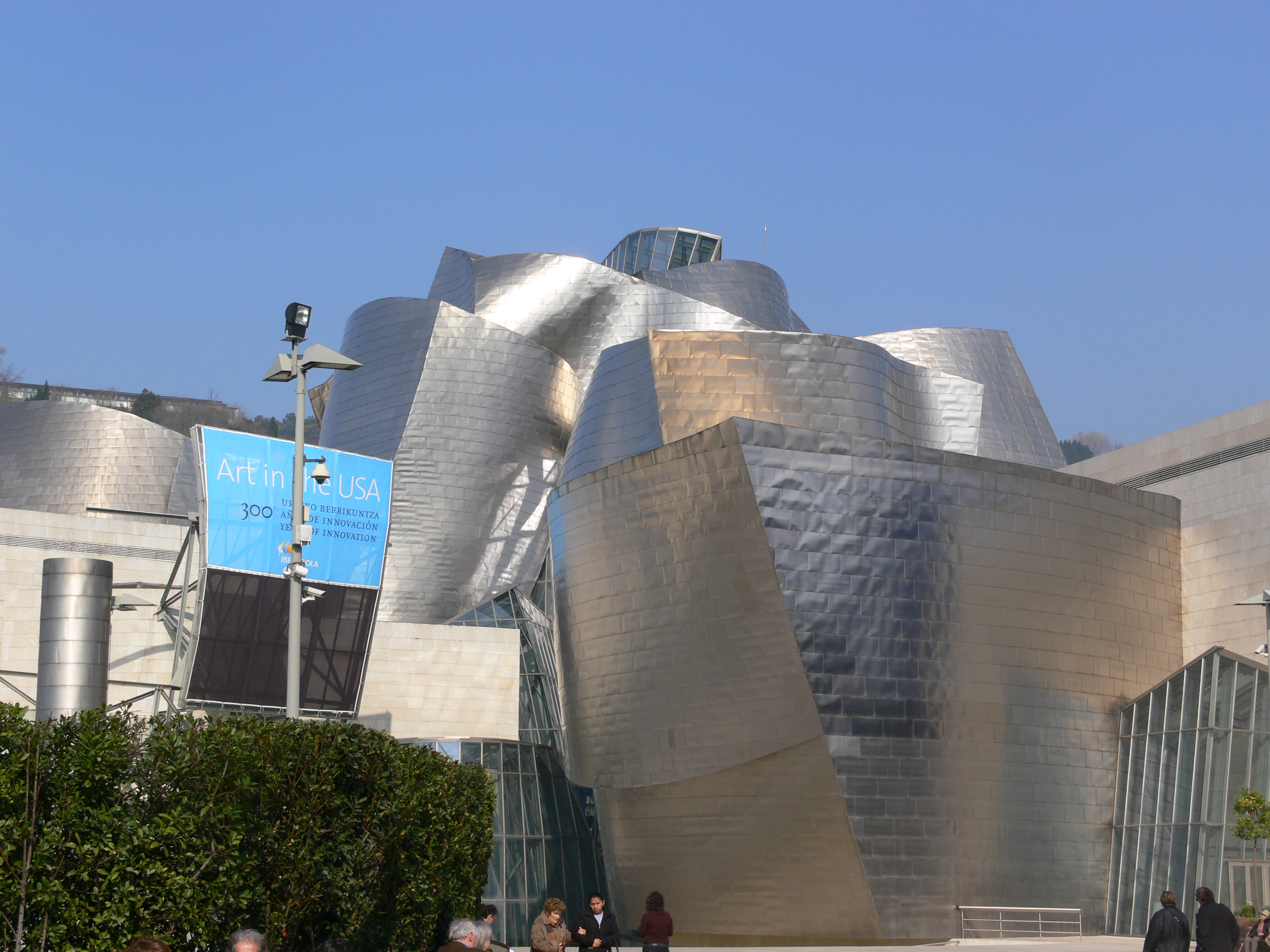 Guggenheim Bilbao Museoa